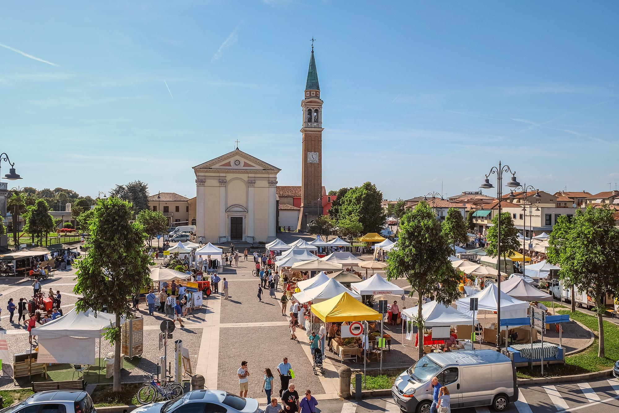 Piazza Marconi a Vigonovo (VE)